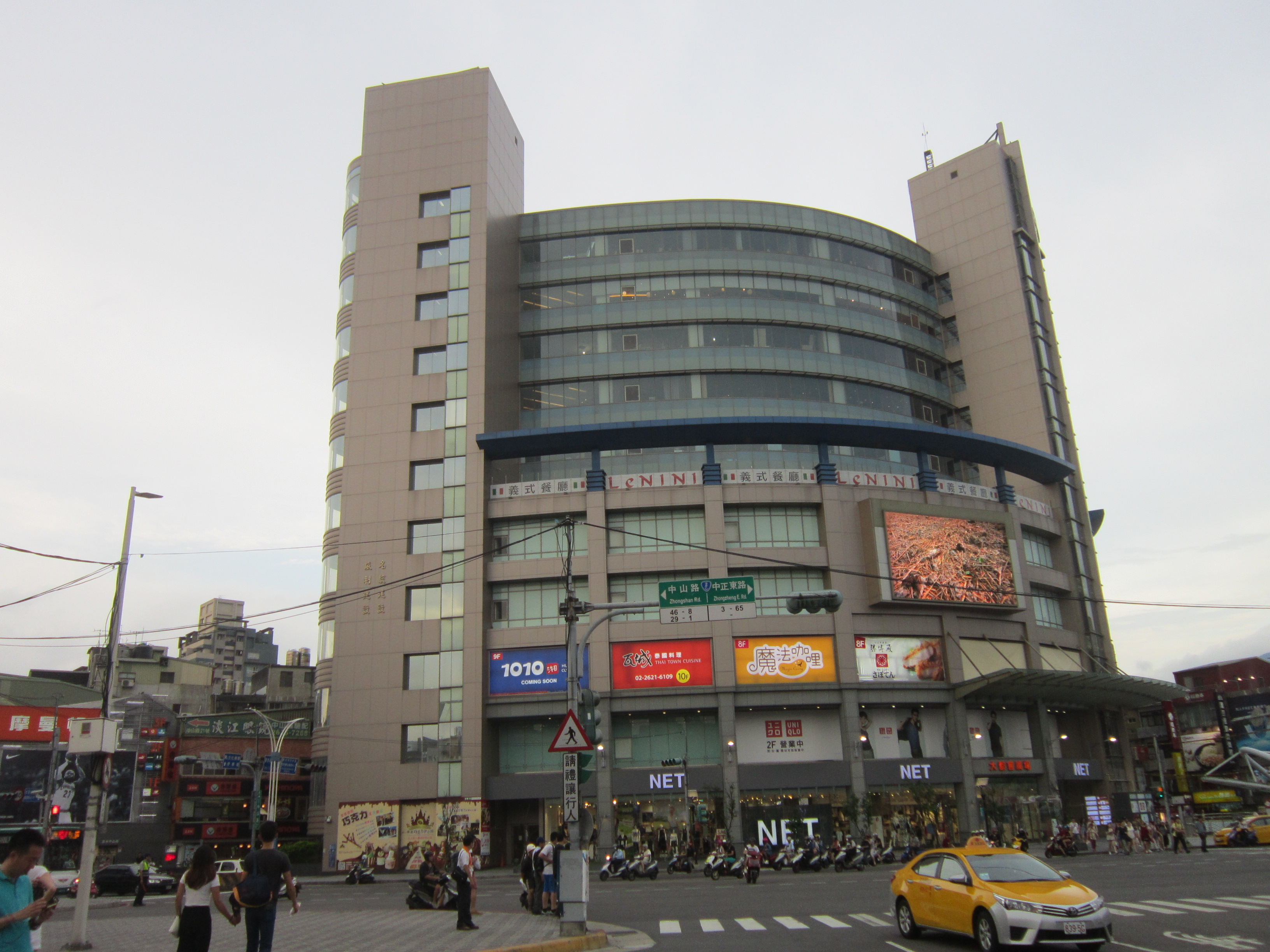 淡水名統百貨更名為大都會廣場後重新營業